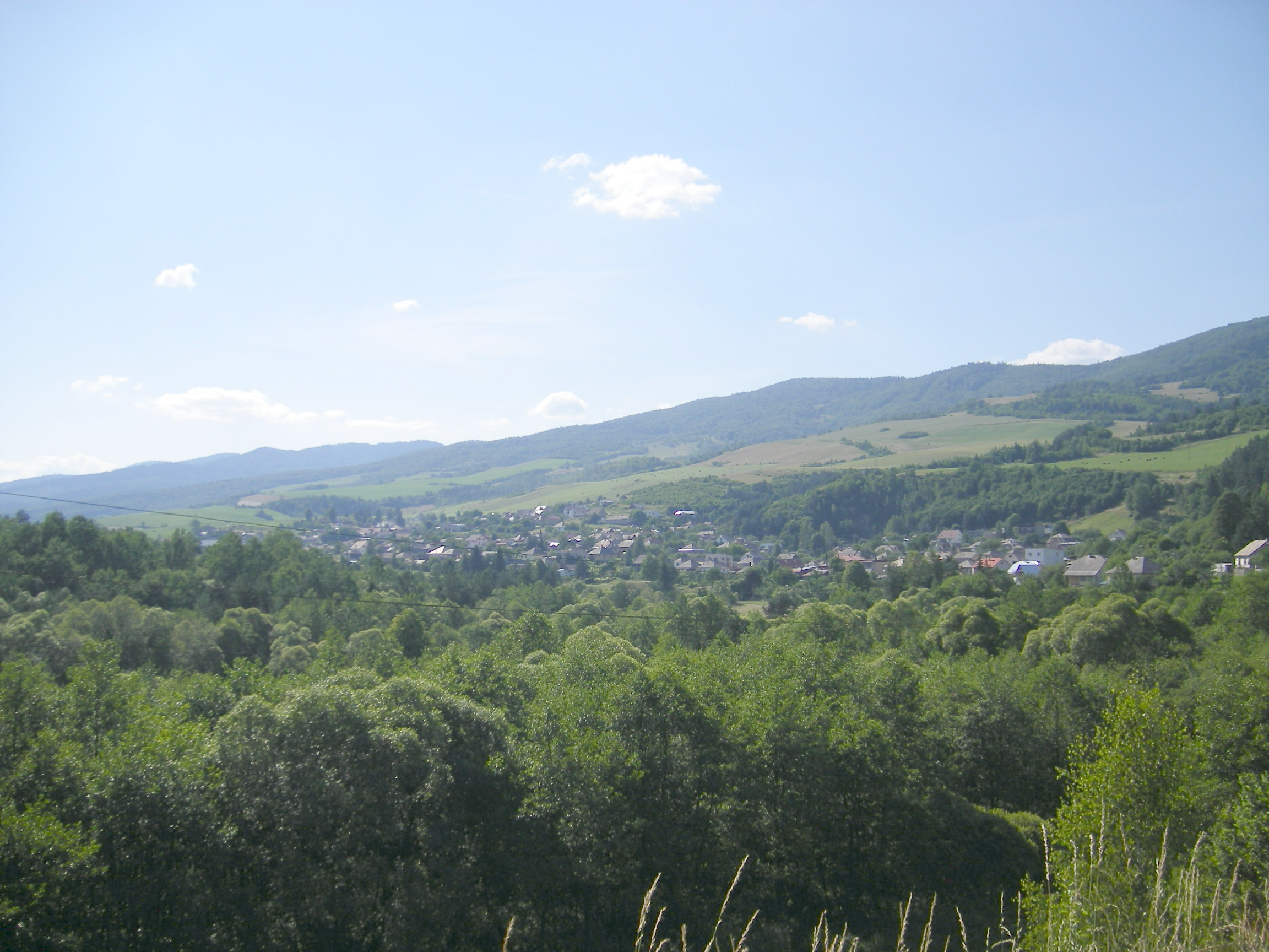 Helcmanovce (okres Gelnica)